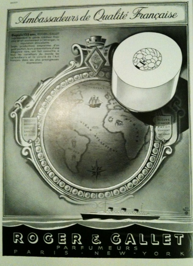 Publicité en noir et blanc Roger & Gallet publiée dans le numéro spécial dédié au paquebot français Normandie (L'Illustration, 1935).